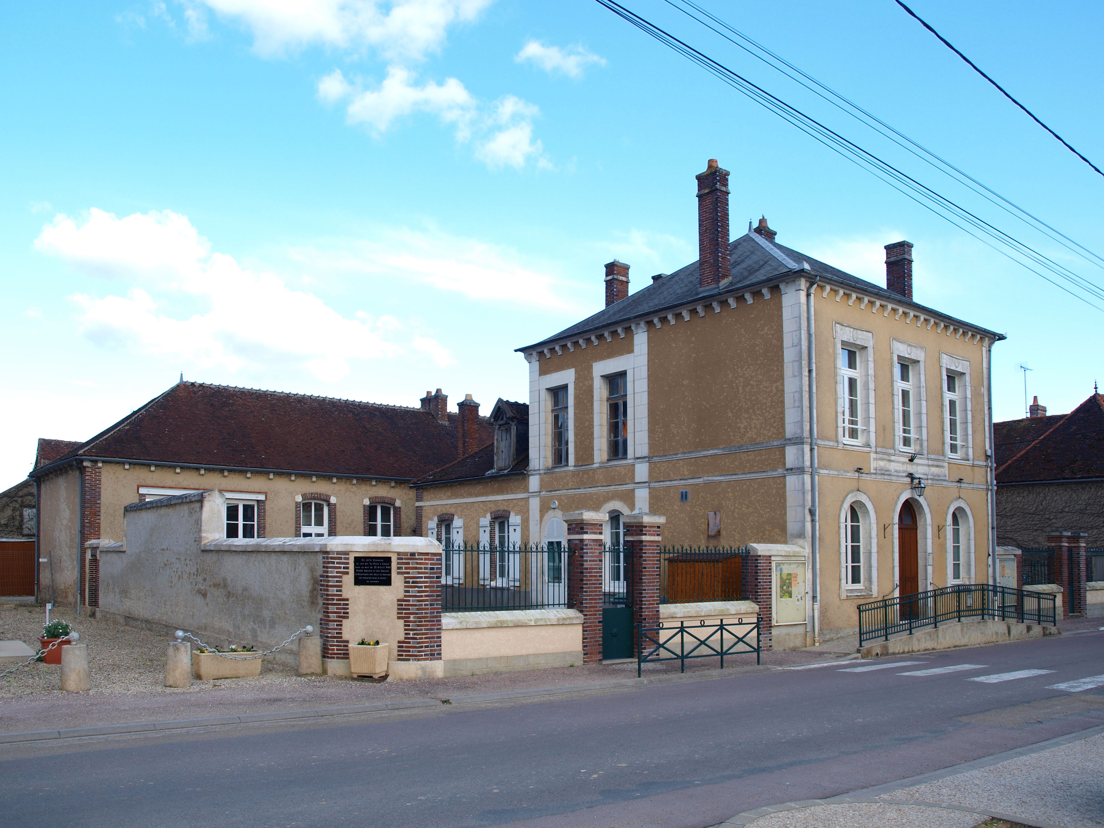 Chassy (Yonne, France) , la mairie.